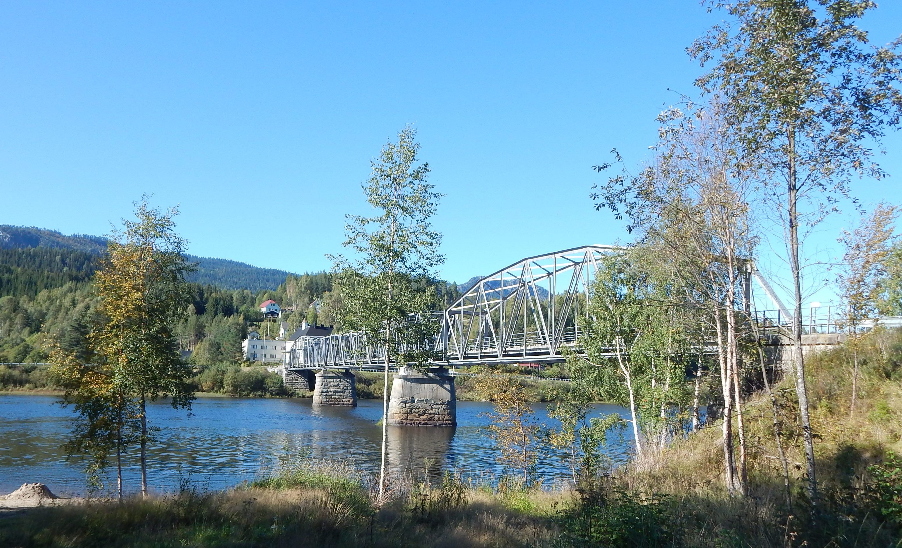 Stai bru fører en arm av fylkesvei 606 over Glomma.